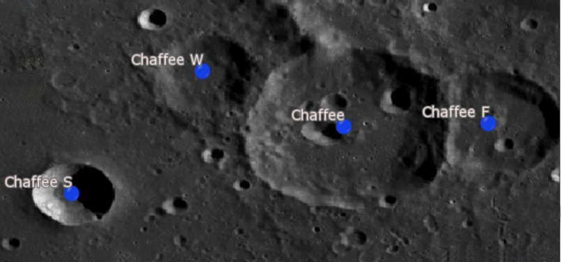 Cráter Chaffee (LROC)